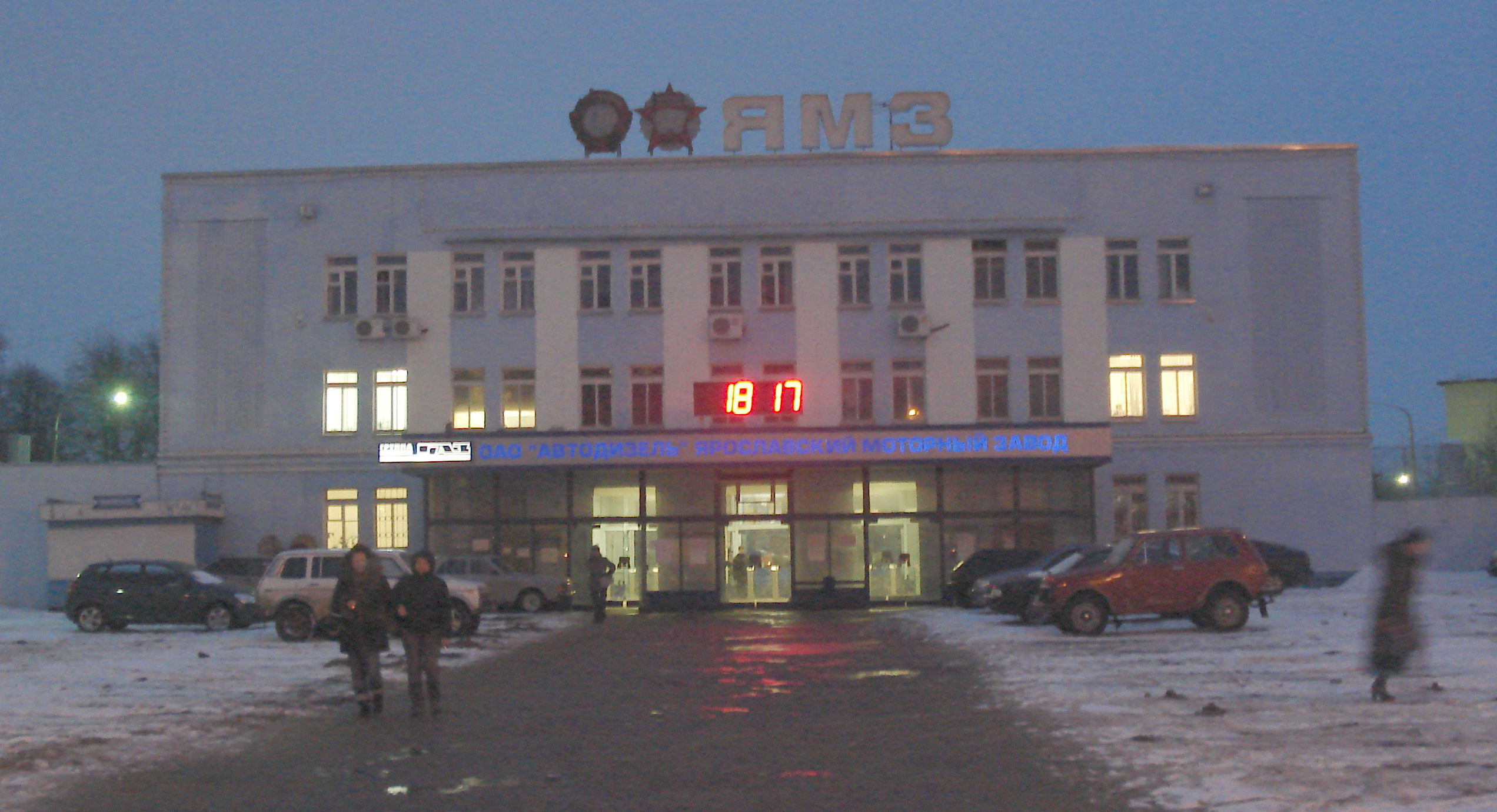 Ярославль, центральная проходная Ярославского моторного завода